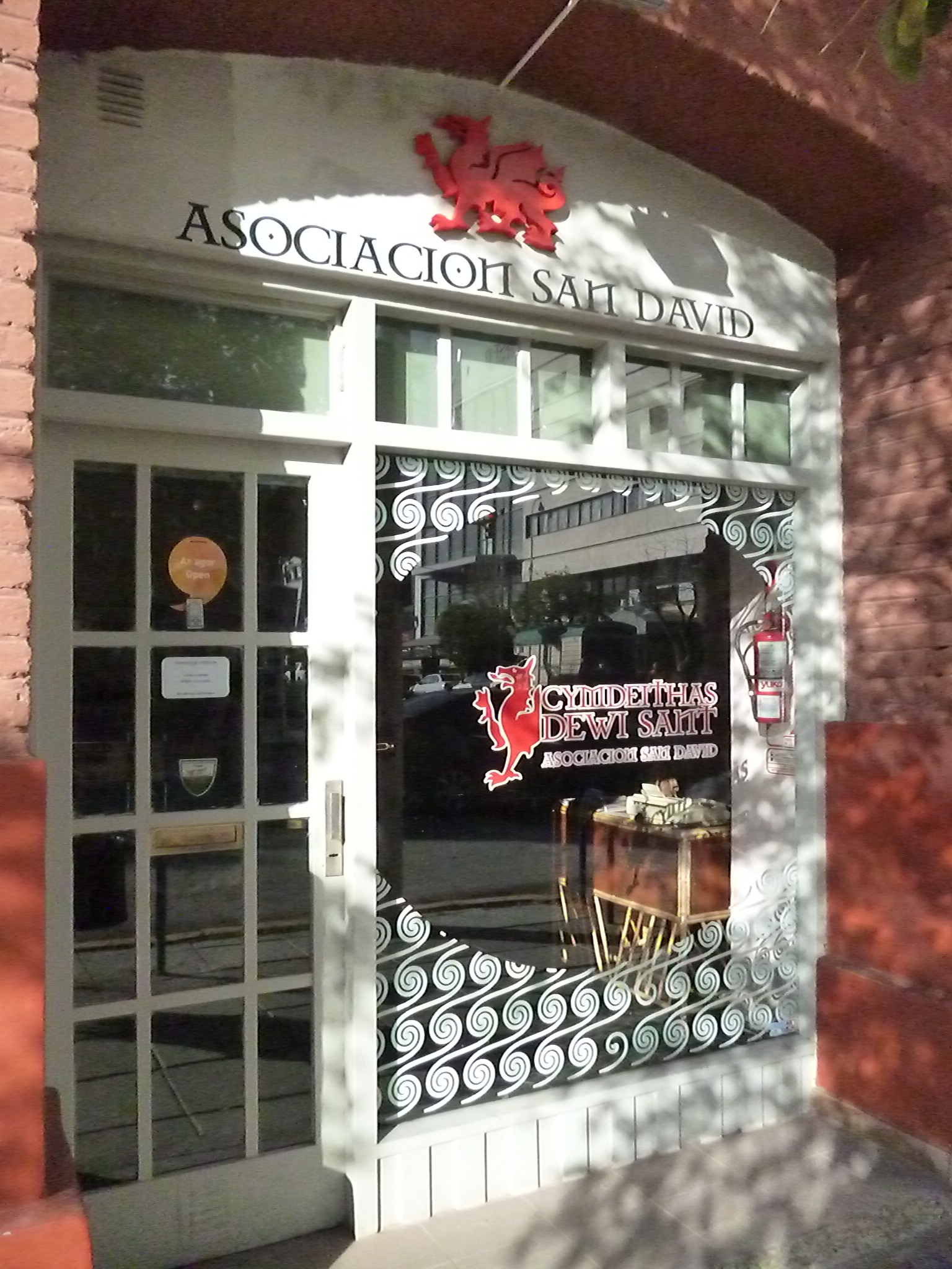 Sede de la Asociación San David. Se observan letreros en idioma galés.